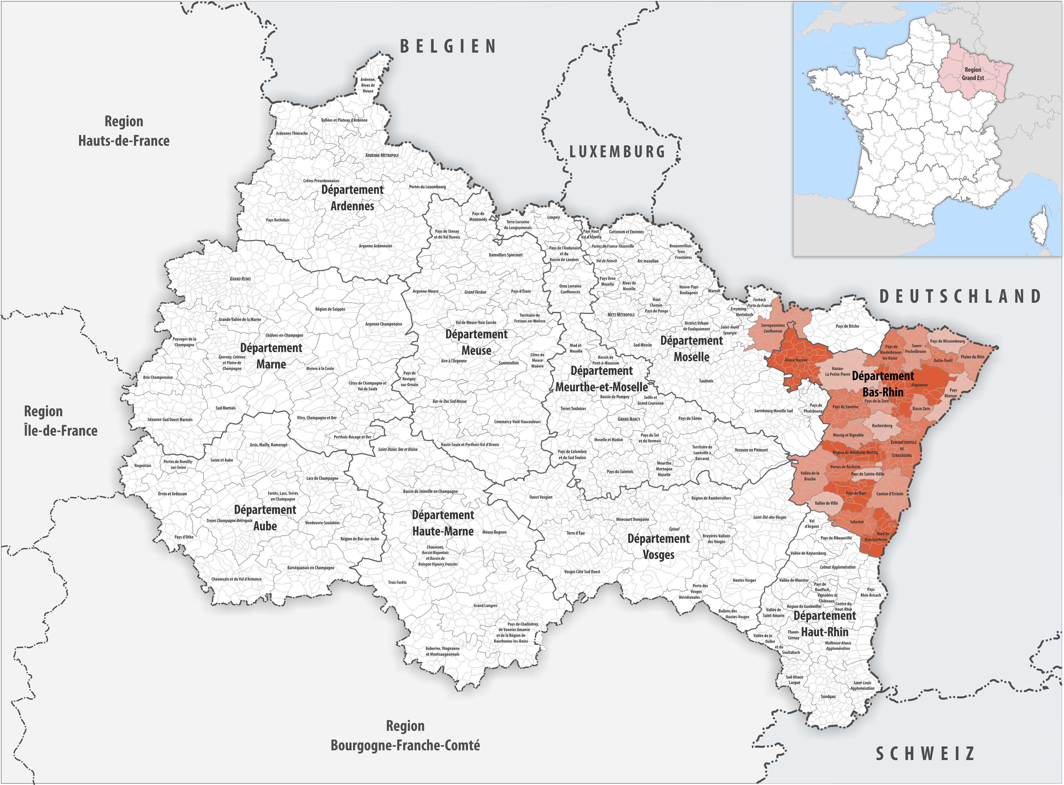 Gemeindeverbände im Département Bas-Rhin